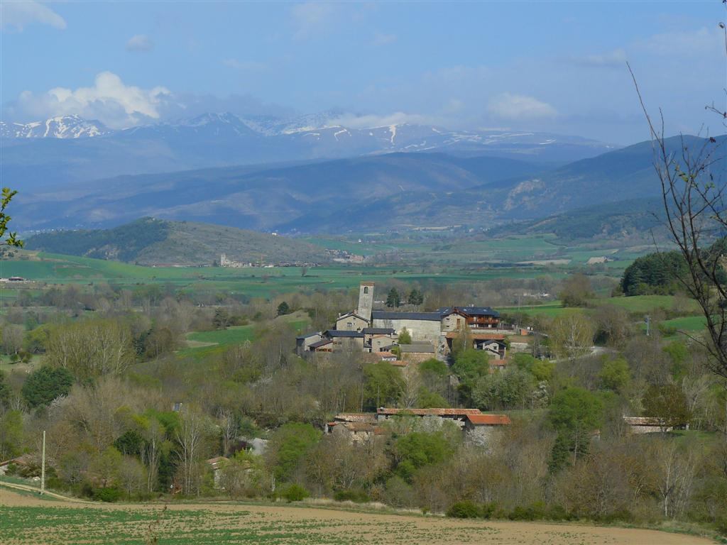 Poble de Santa Eugènia de Nerellà